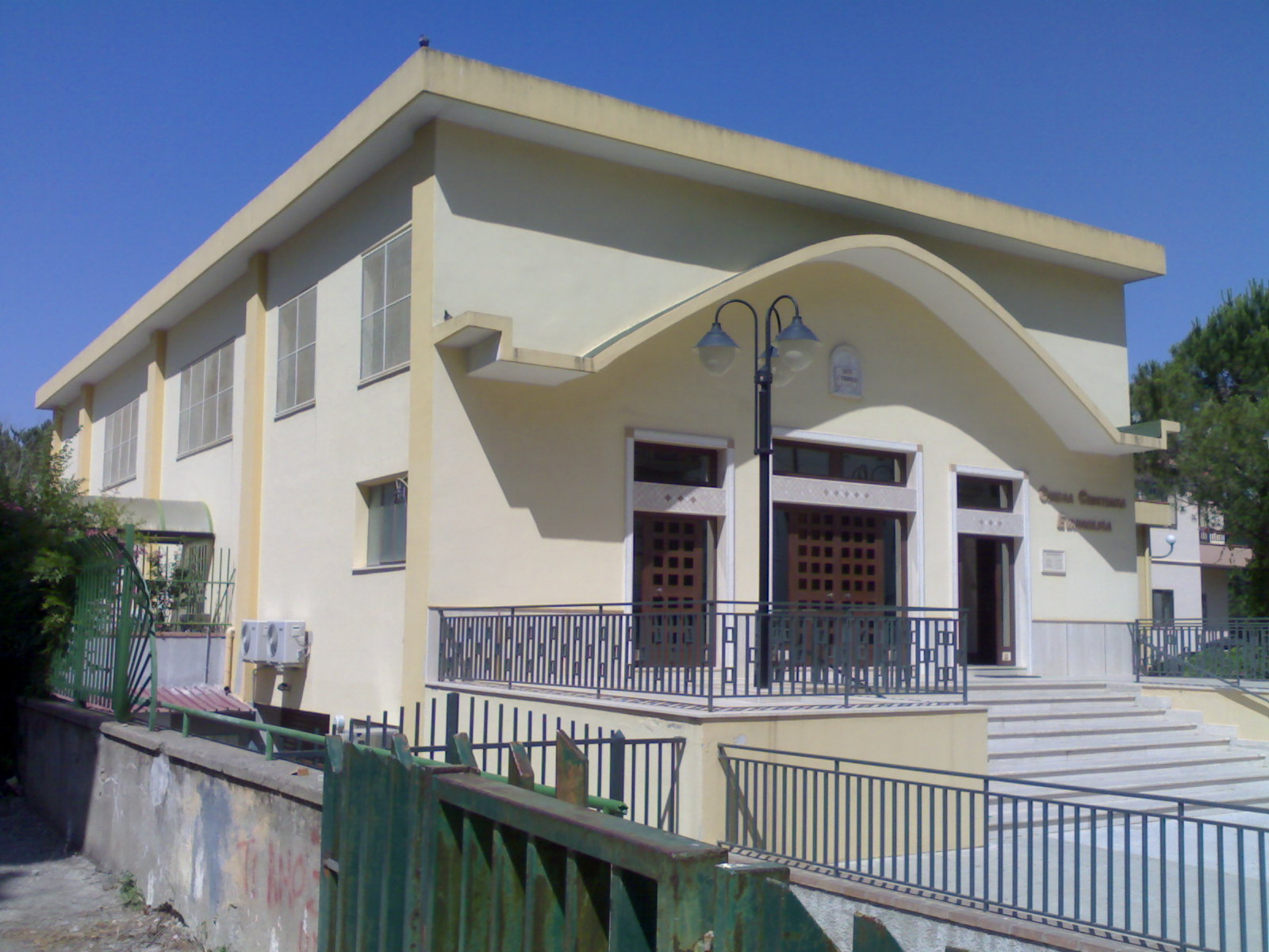 La Chiesa Evangelica Pentecostale "Assemblee di Dio" di Crotone